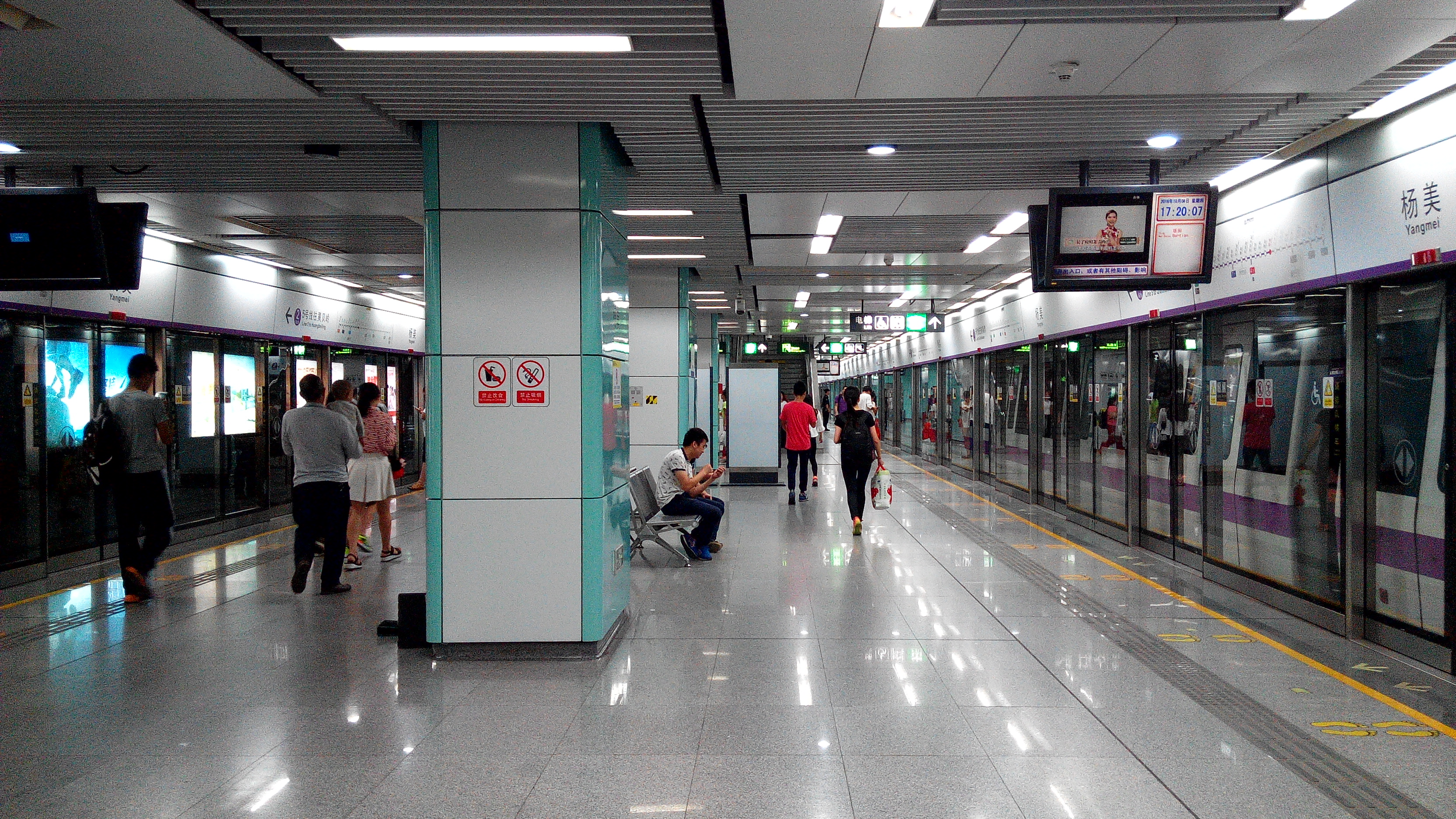 深圳地铁5号线杨美站站台